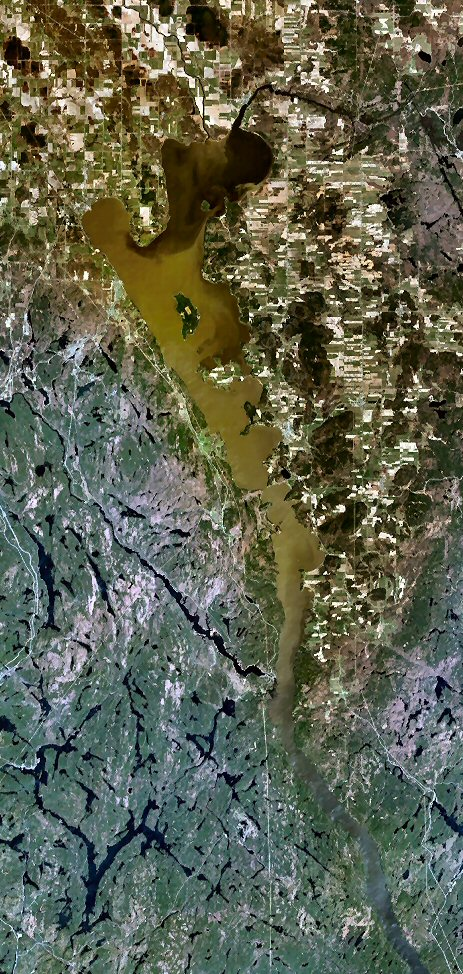 Lake Timiskaming, Ontario and Quebec, Canada.